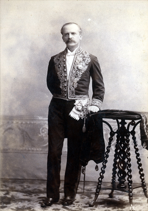 Retrato de Mariano Sanchez Fontecilla (Santiago de Chile, 12 de febrero de 1840 — 5 de enero de 1914) fue un abogado, diplomático y político chileno, ministro de Estado en varios gobiernos.